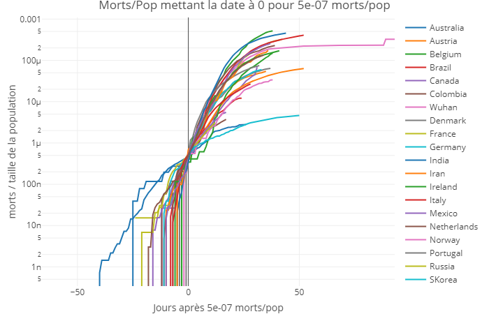 Proportion du nombre de morts de Covid-19 dans la population de multiples pays, date 0 au seuil de 5 morts pour 10 millions d'habitants, mis à jour le 22 avril 2020.